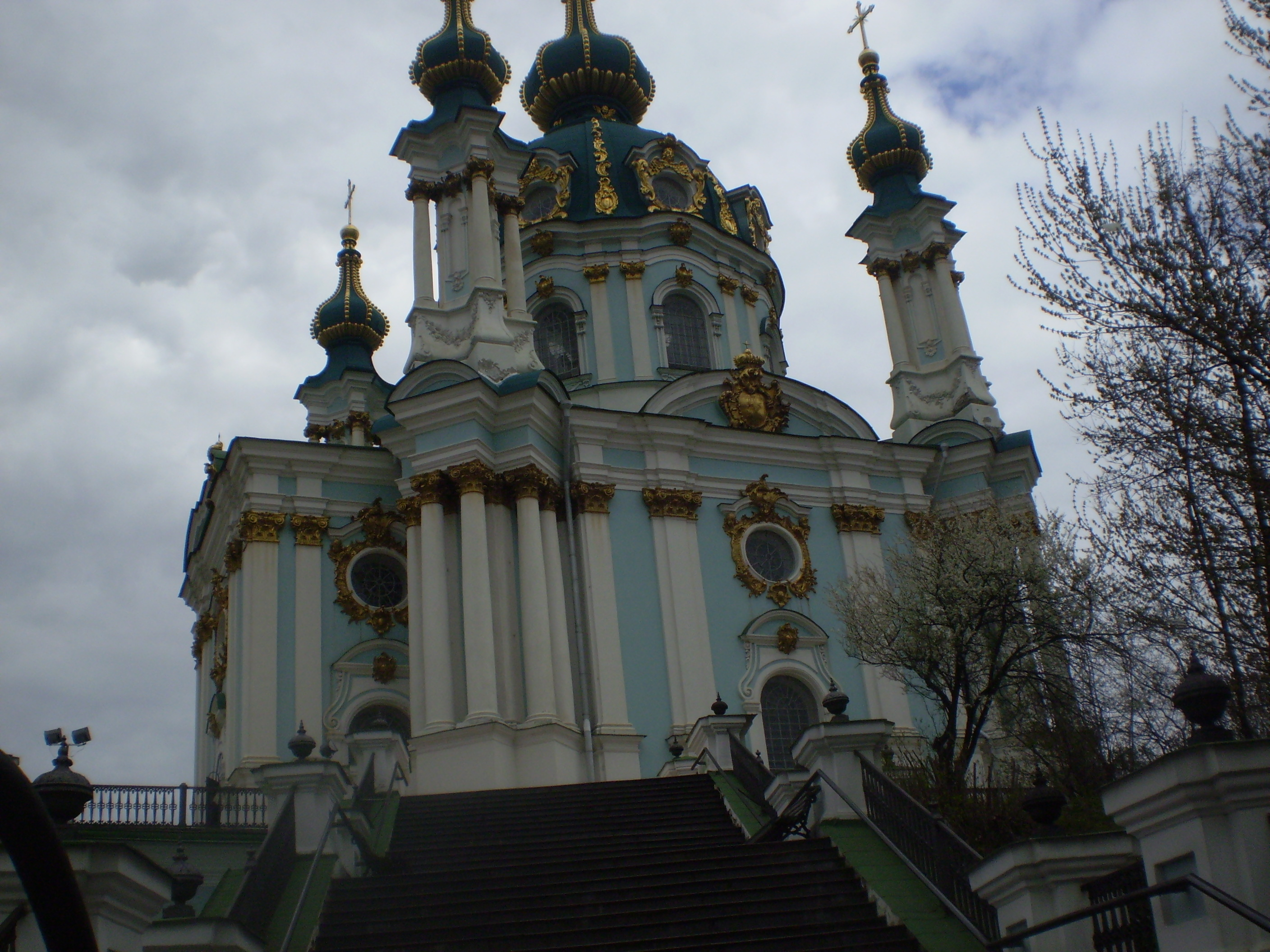 Andreaskathedrale in Kiew